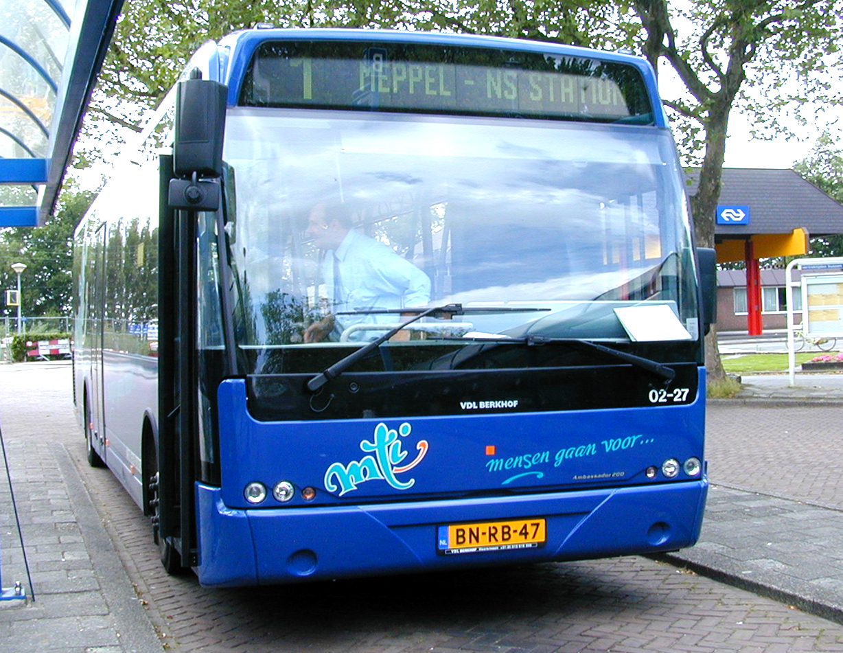 Millennium Transportation International (MTI) bus 02-27 van het type Berkhof Ambassador ALE 120 te Hoogenveen. Deze bus werd hierna BBA-Connex: 905, Veolia: 905 en Connexxion: 3157.